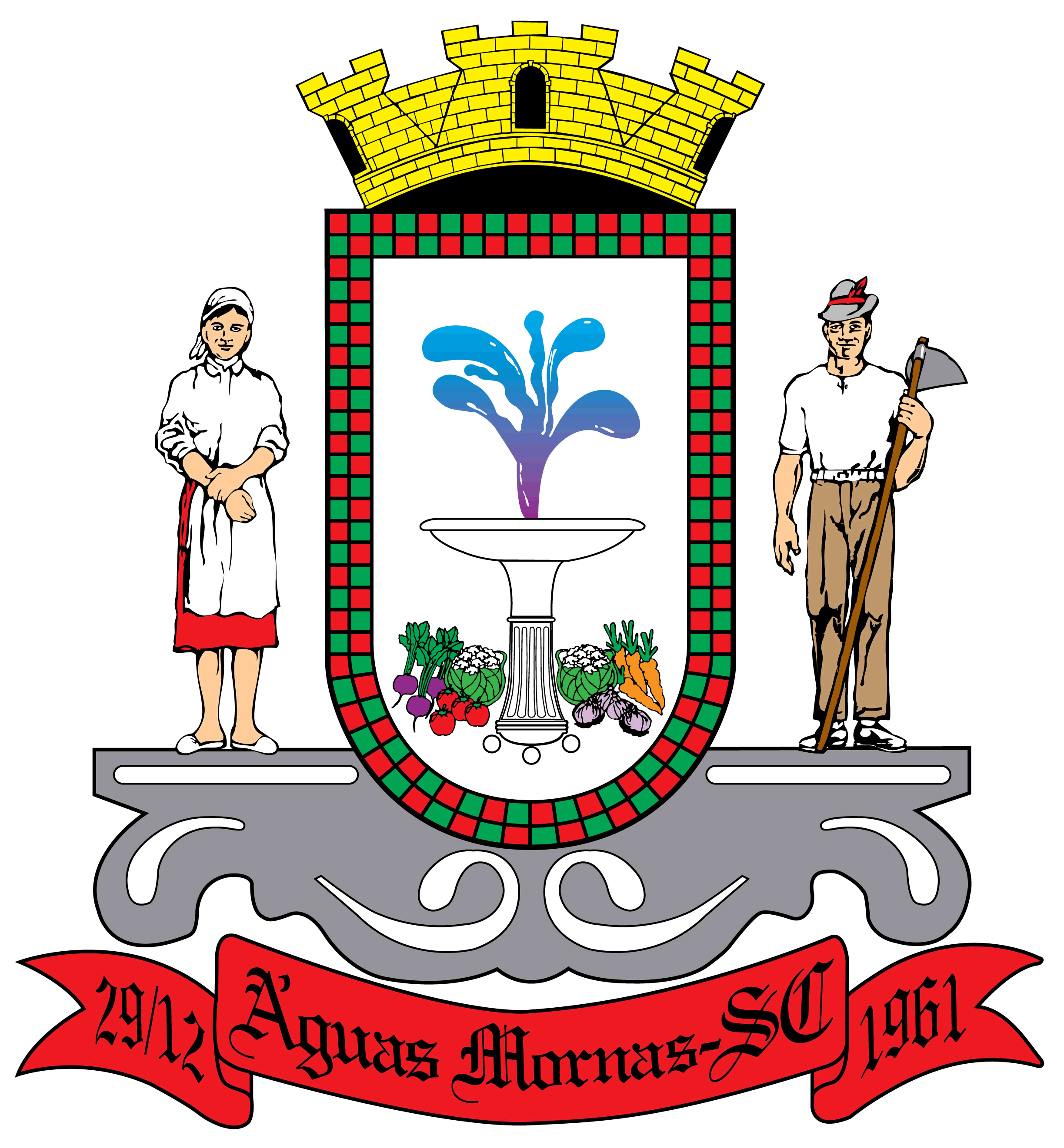 Brasão do Município de Águas Mornas - Santa Catarina - Brasil